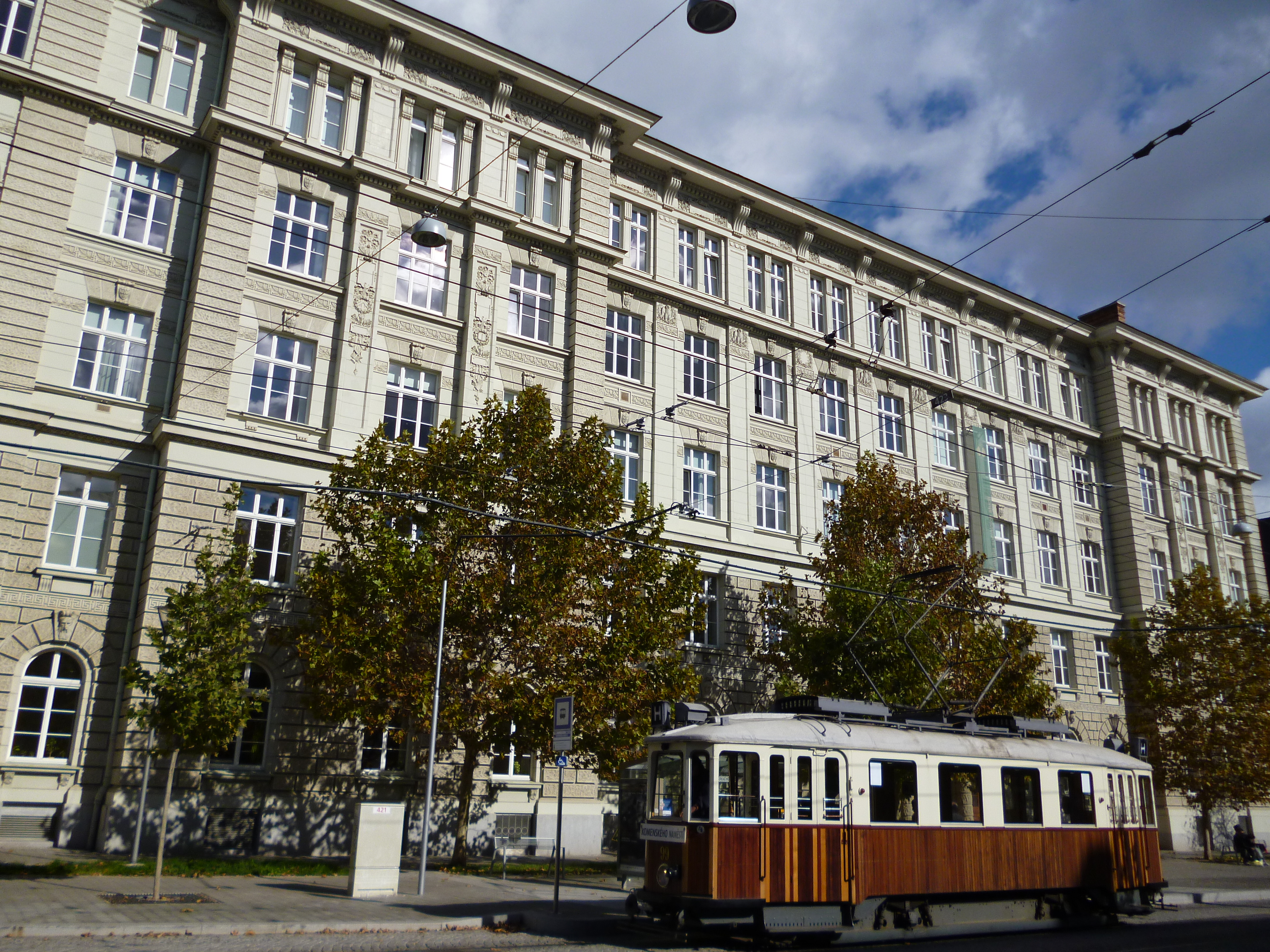 Vysoká škola - pův. Německá vysoká škola technická (Brno), Brno - město, Joštova 218/10, Brno